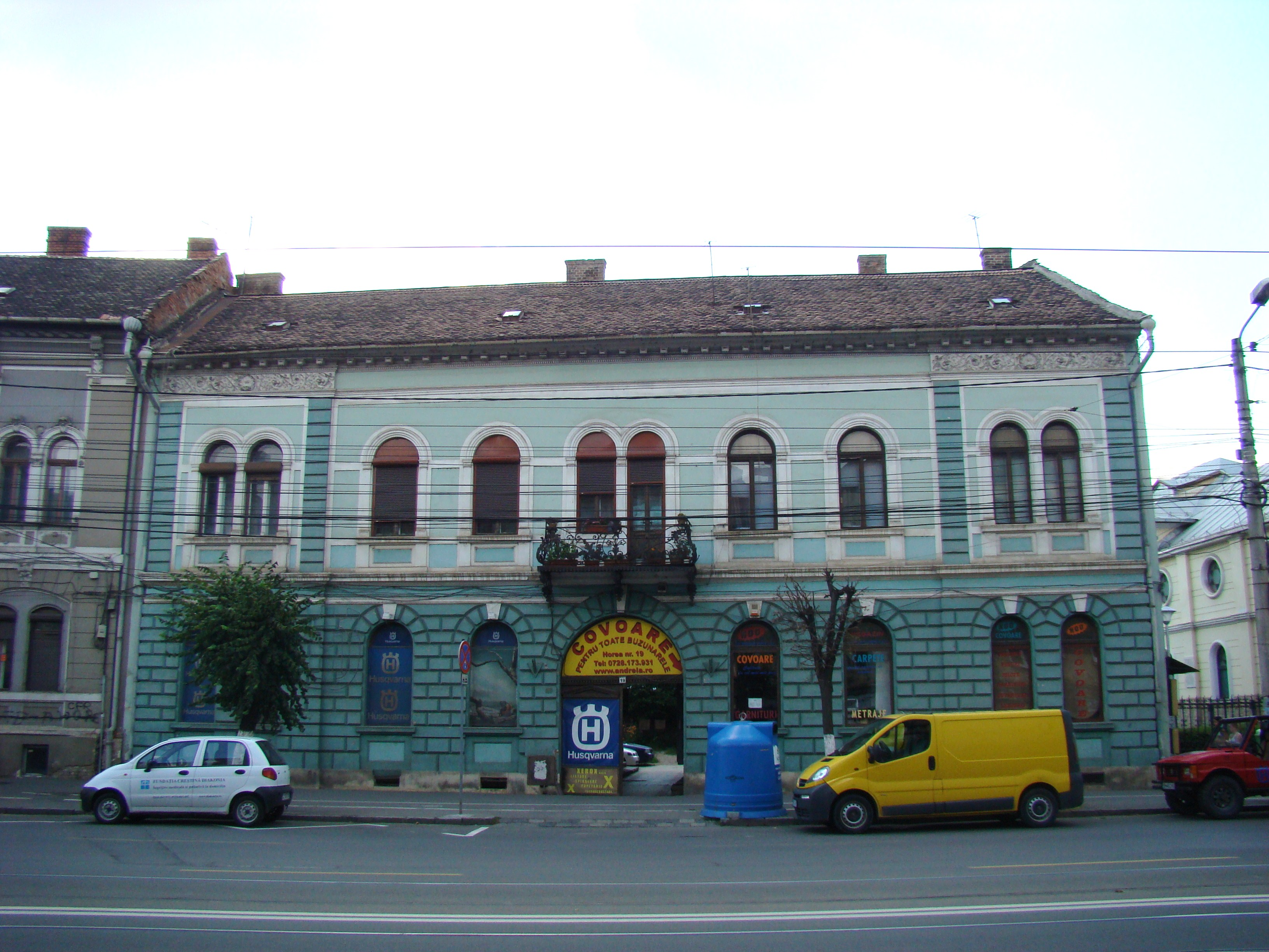 Clădire monument istoric, str. Horea, nr.19